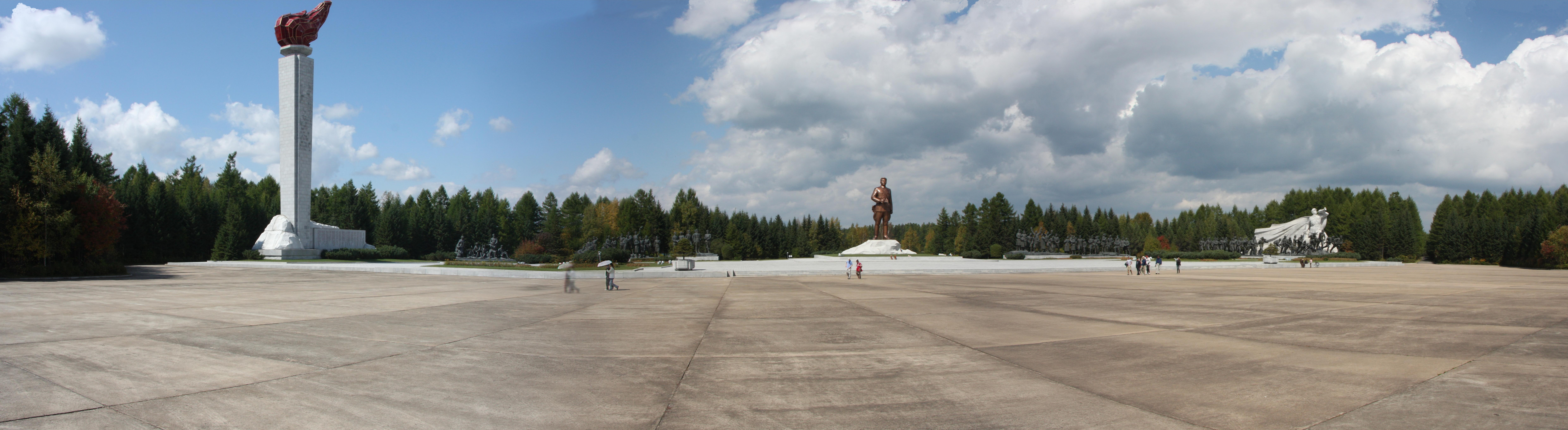 Panorama of Samjiyon Grand Monument